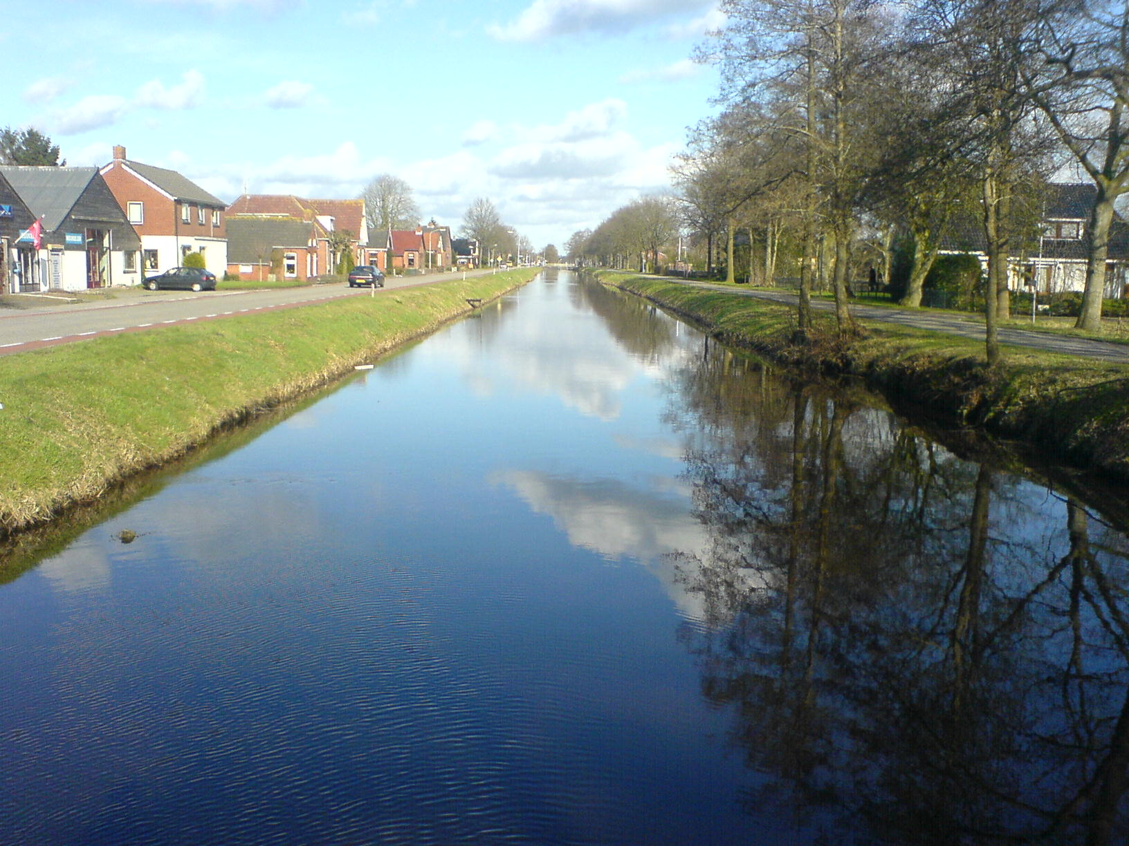 NL: Het Leekster Hoofddiep (zelf genomen, 8 maart 2007)